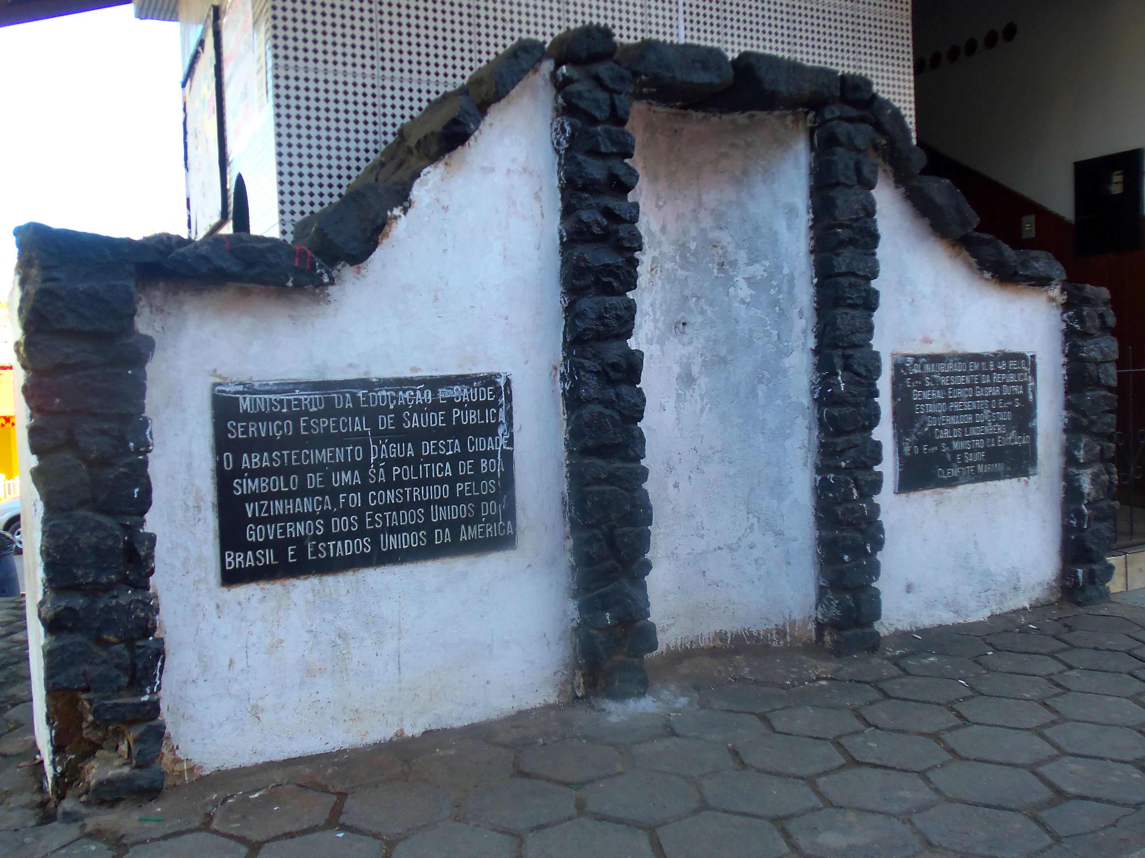 Fonte desativada do Serviço Especial de Saúde Pública (Sesp) na avenida Presidente Vargas, em Fundão, Espírito Santo. Sua inscrição diz: "Ministério da Educação e Saúde Serviço Especial de Saúde Pública O abastecimento d'água desta Cidade, símbolo de uma sã política de boa vizinhança, foi construído pelos Governos dos Estados Unidos do Brasil e Estados Unidos da América. Foi inaugurado em 11.9.1949 pelo Exmº Sr. Presidente da República General Eurico Gaspar Dutra estando presentes o Exmº Sr. Governador do Estado Carlos Lindenberg e o Exmº Sr. Ministro da Educação e Saúde Clemente Mariani.